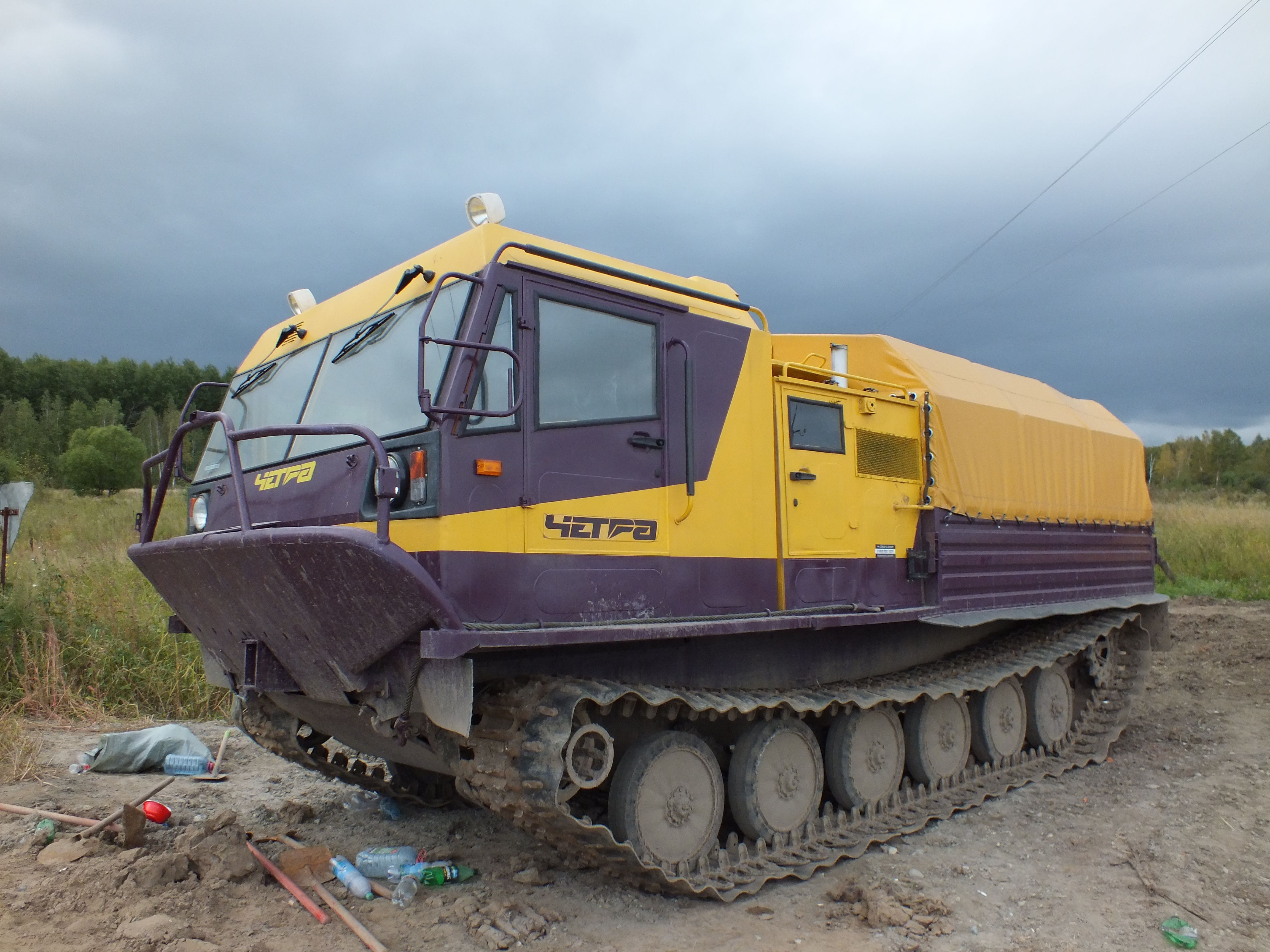 Плавающий вездеход ЧЕТРА ф1